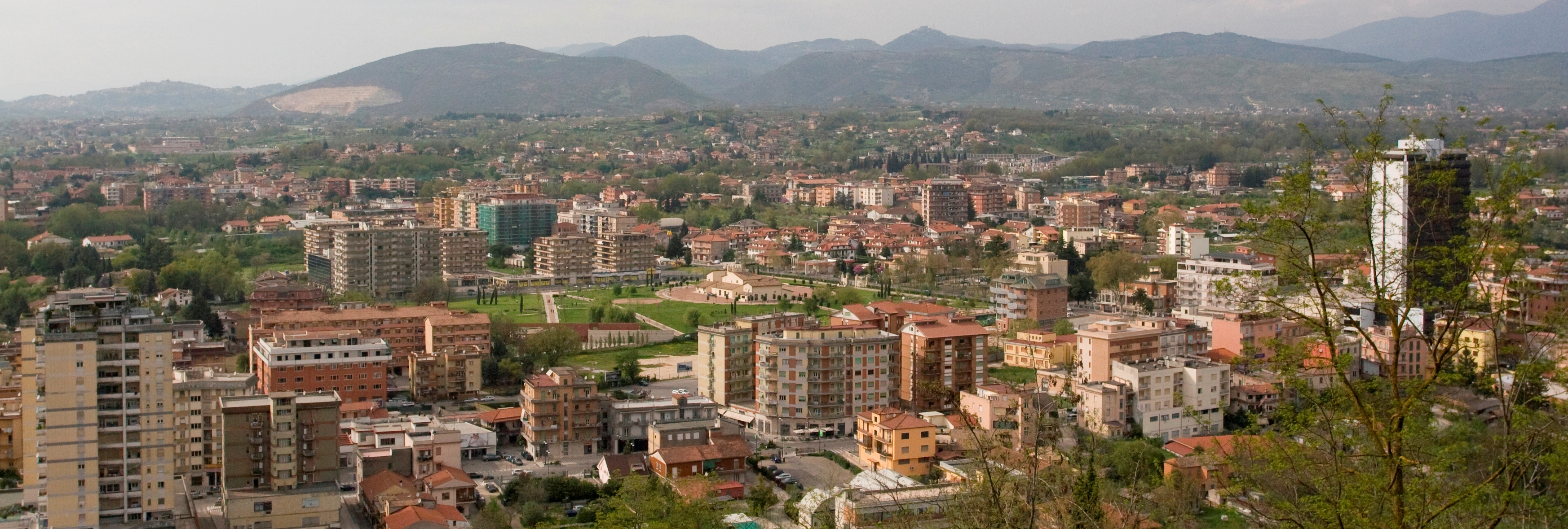 Panorama di Frosinone da Via Belvedere